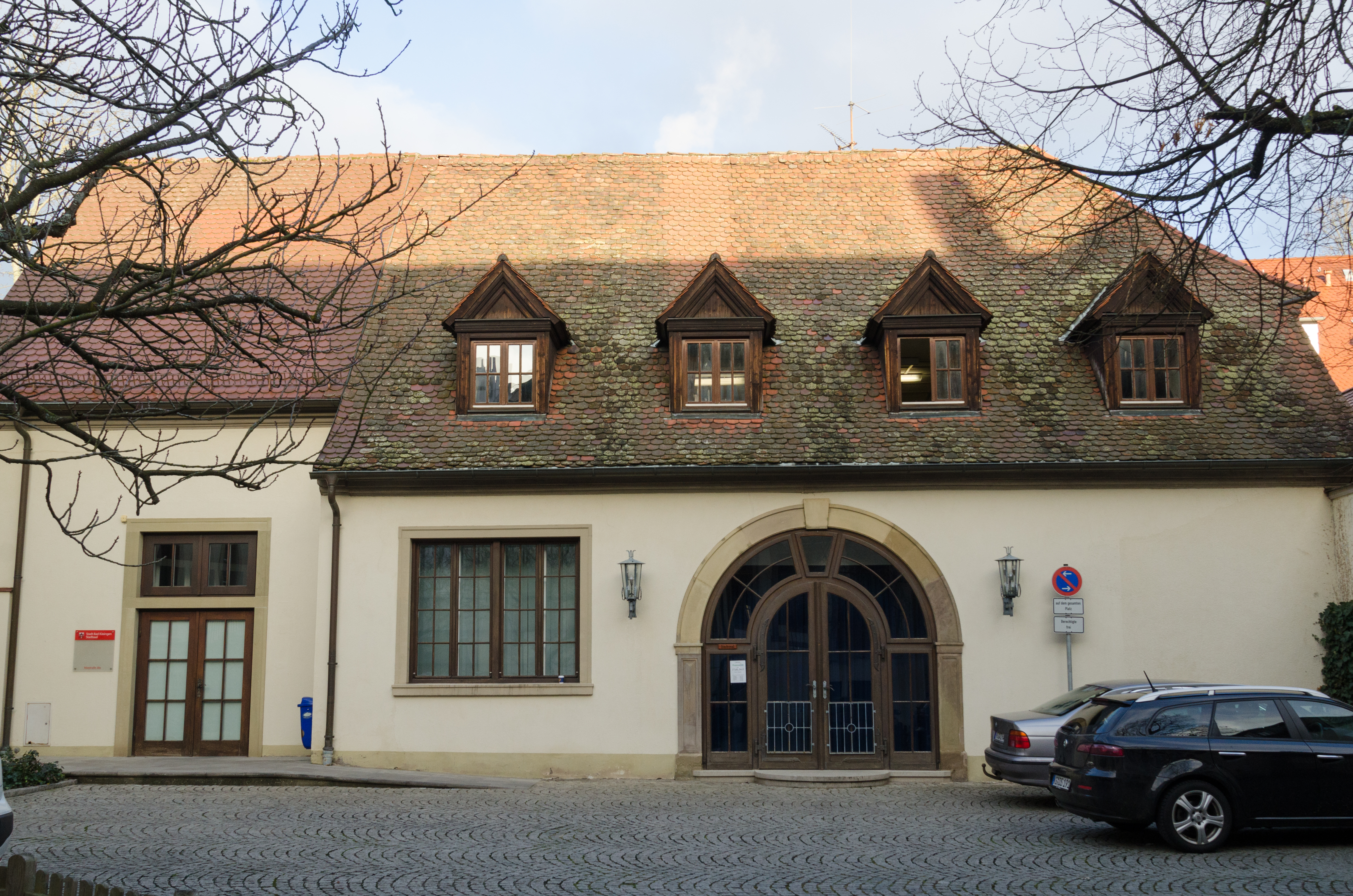 Bad Kissingen, Rathausplatz 2, Ökonomie, 2015-01